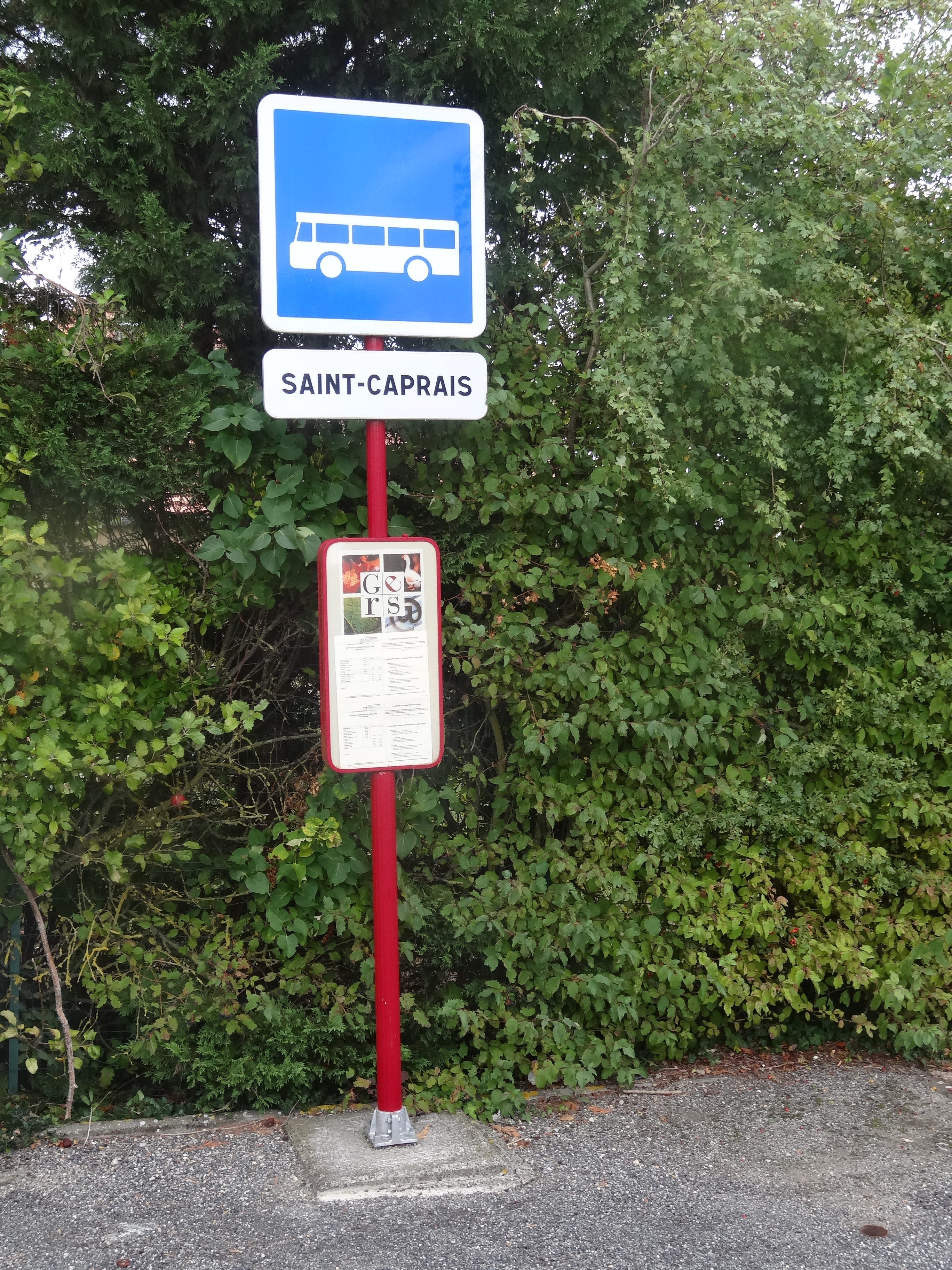 Arrêt de bus de Saint-Caprais dans le Gers.